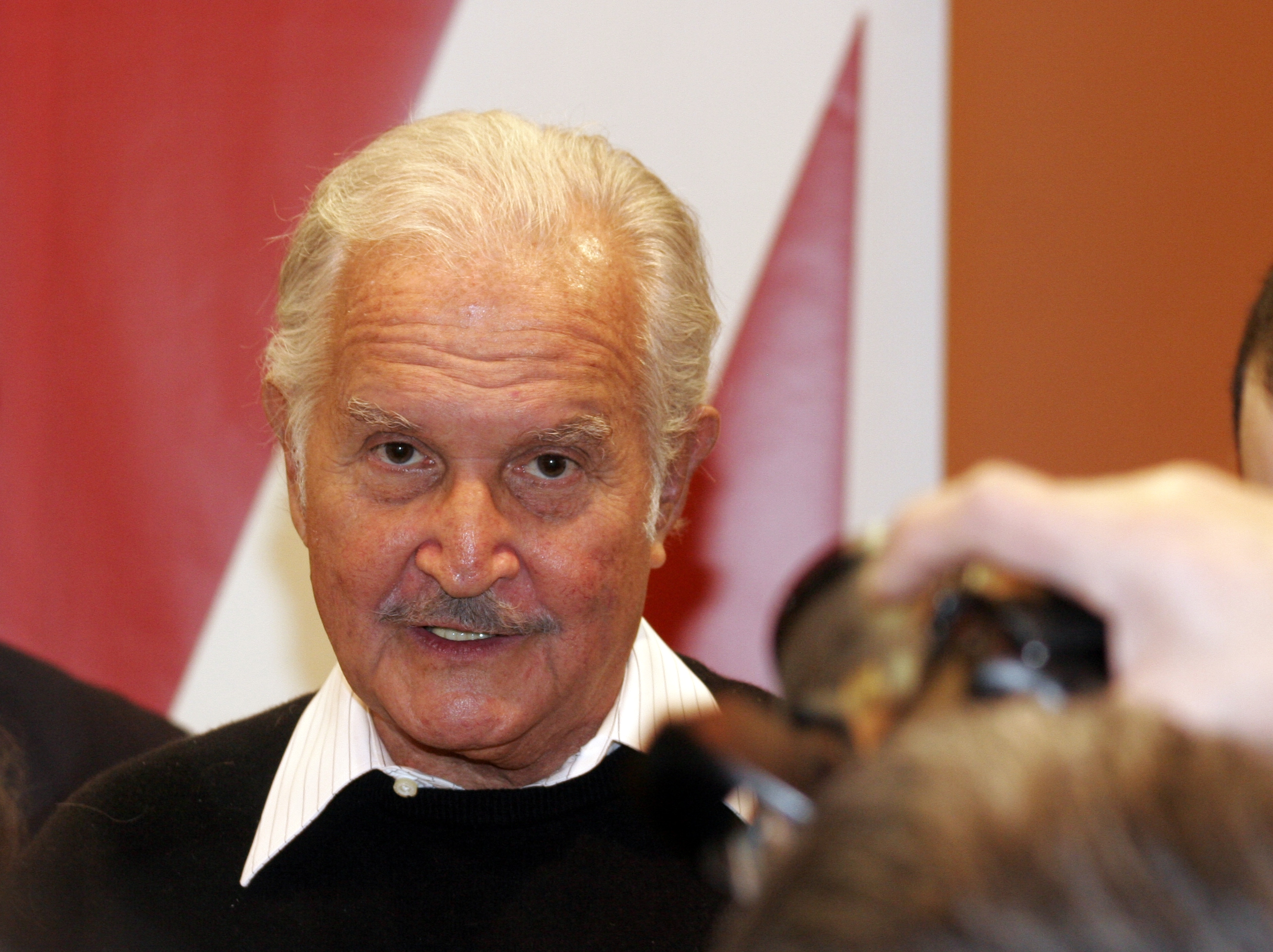 Carlos Fuentes, en mars 2009 à Paris.